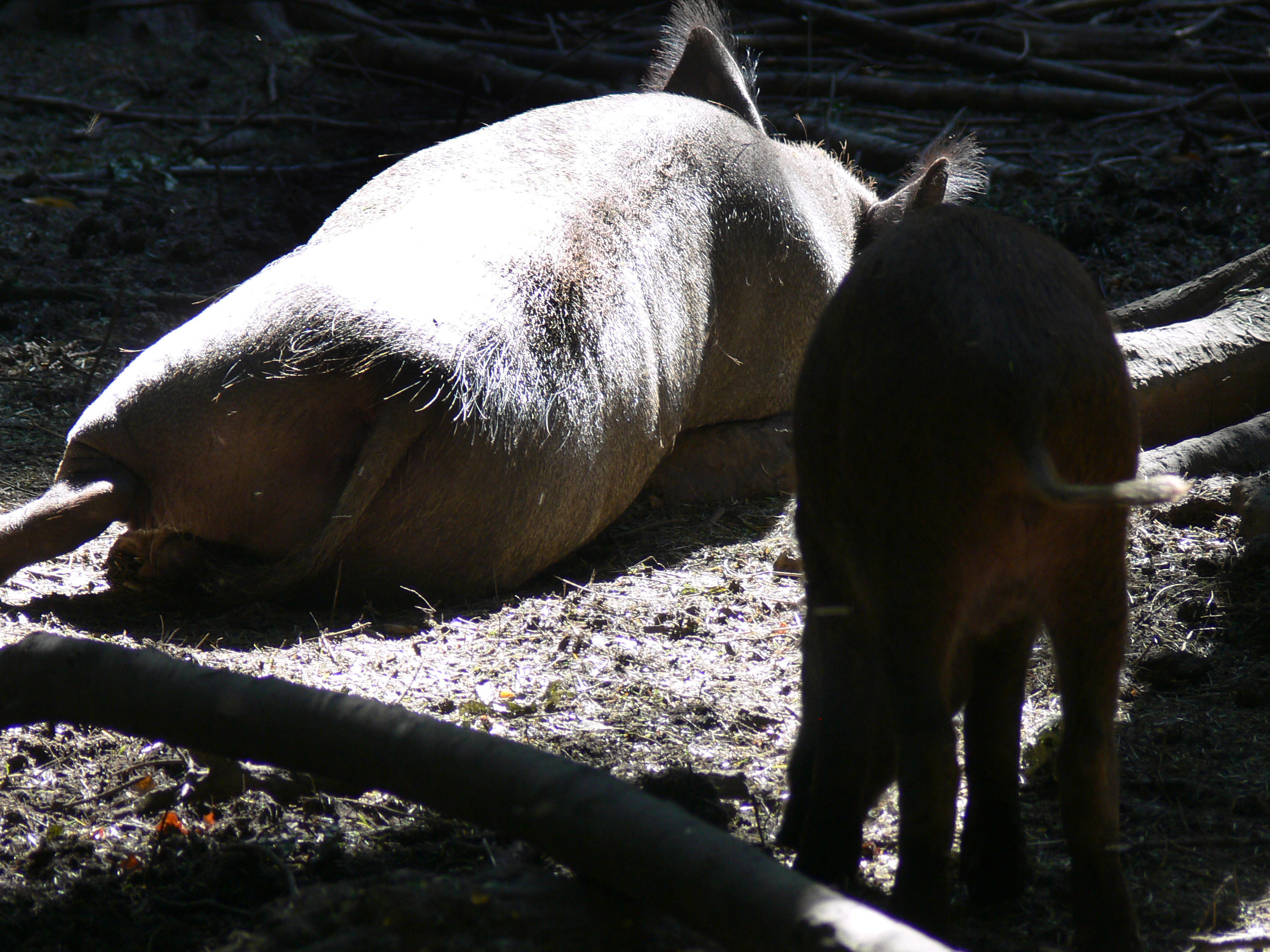 sanglier Parc de découverte de Wildwood